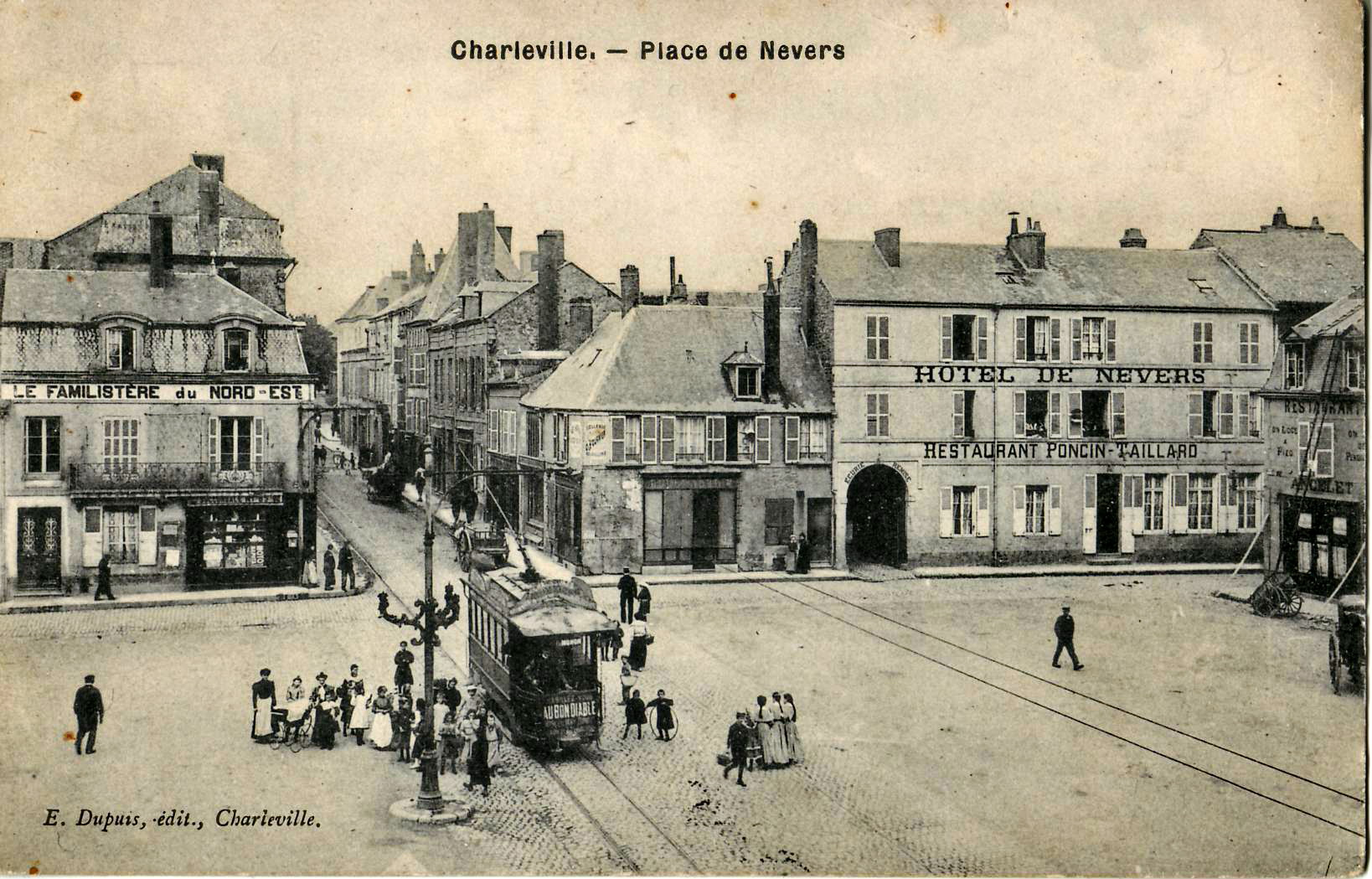 Carte postale ancienne, éditée par E. Dupuis à Charleville : CHARLEVILLE - Place de Nevers.Vue d'une motrice du tramway de Charleville-Mézières